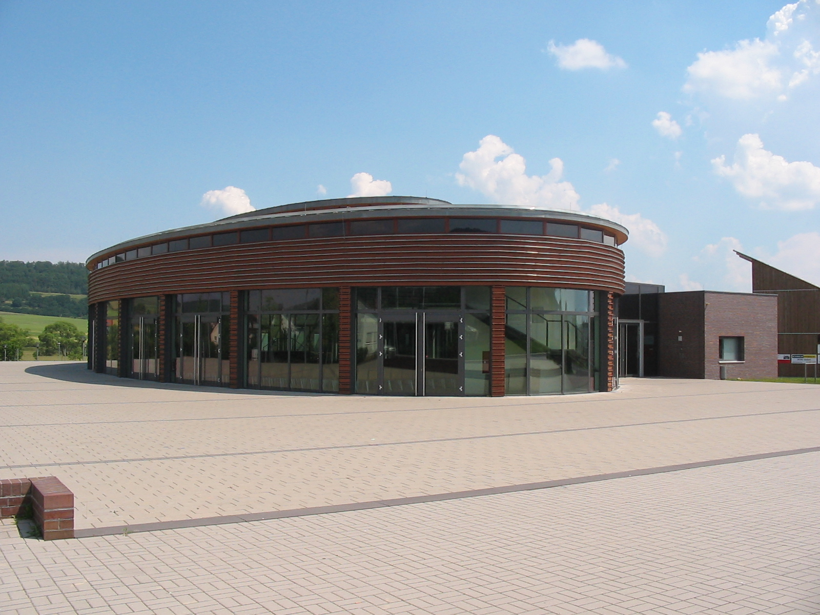 Das Wartenberg Oval ist ein Veranstaltungsplatz und ein multifunktionaler Gebäudekomplex in Wartenberg-Angersbach (Hessen)